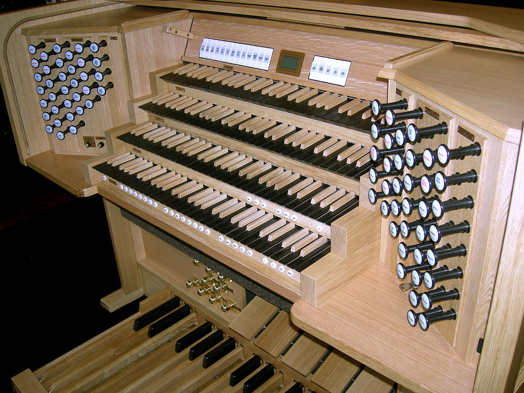 Modèle d'orgue numérique - Orgue Johannus Rembrandt 4090 (construit en 2006) Digital organ